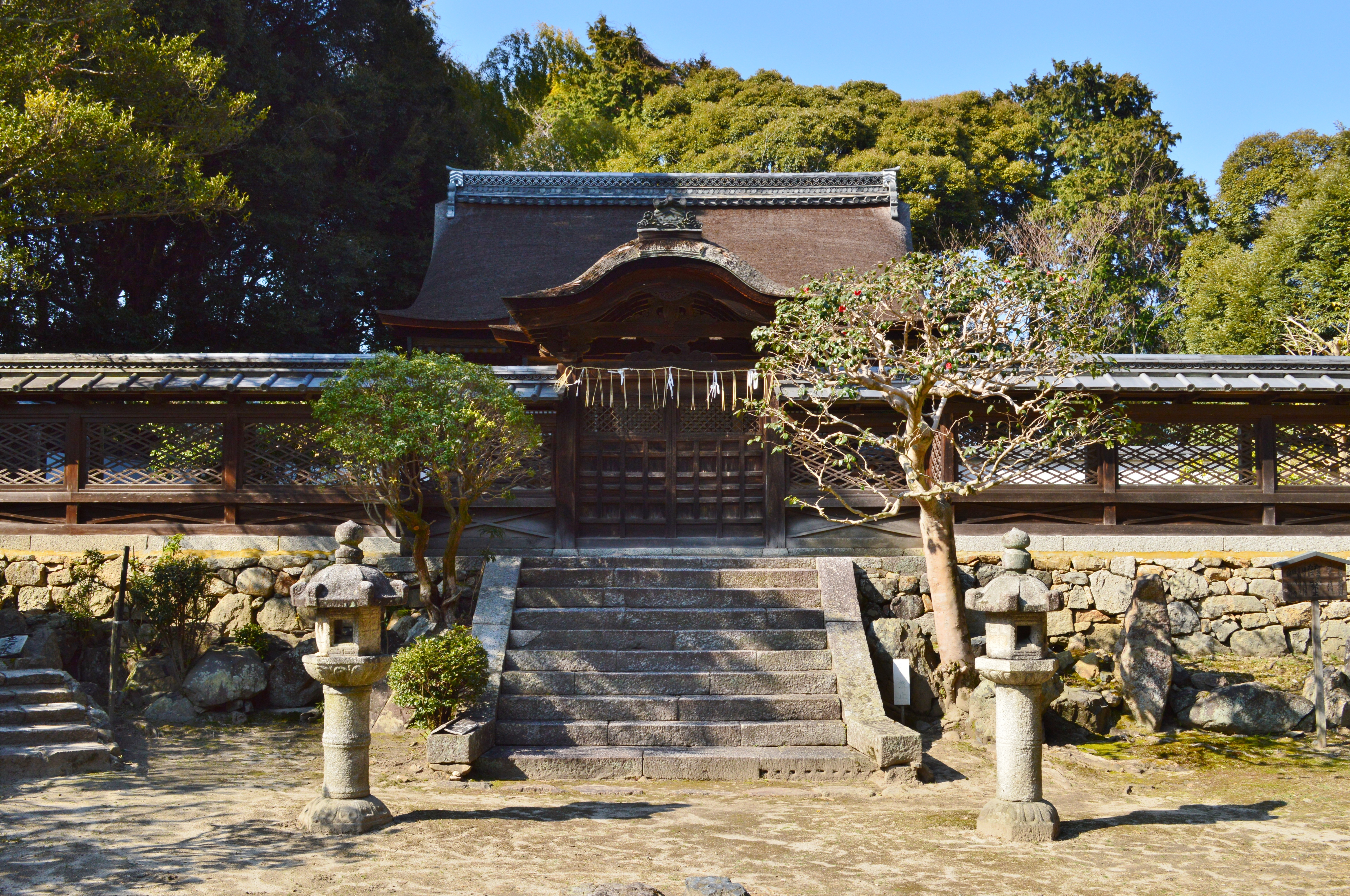 新羅善神堂 正面